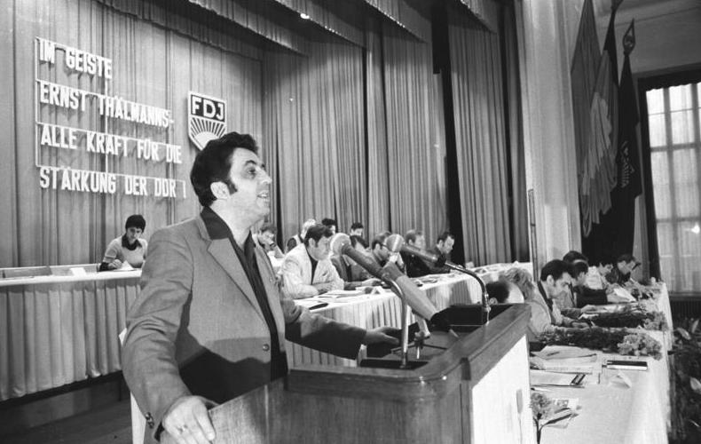 ADN-ZB/Koard/10.1.74/Berlin: Aktivisten des Jugendverbandes lösen "FDJ-Initiative DDR 25" aus. Zentrales FDJ-Aktiv beriet Beschluß der 10. Zentralratstagung. Das Aktionsprogramm des sozialistischen Jugendverbandes der DDR für die nächsten 10 Monate, das unter der Losung steht "Alle Kraft für die Stärkung der DDR, unseres sozialistischen Vaterlandes" berieten am Donnerstag (10.1.74) 750 FDJ-Aktivisten in der Jugendhochschule "Wilhelm Pieck" am Bogensee. Das Referat hielt der 1. Sekretär des Zentralrats der FDJ, Egon Krenz, Mitglied des ZK.